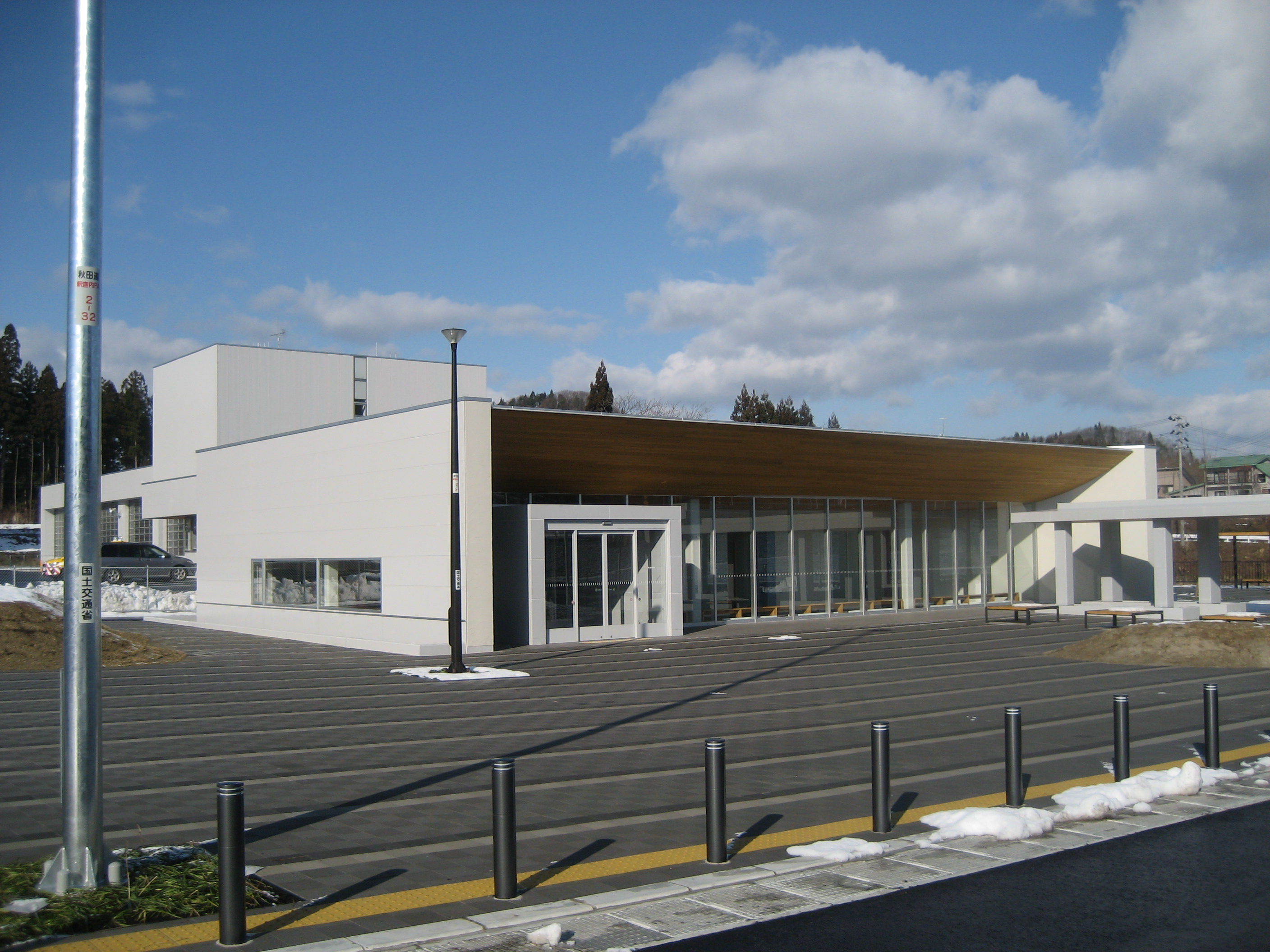 秋田県大館市にある秋田自動車道釈迦内パーキングエリア